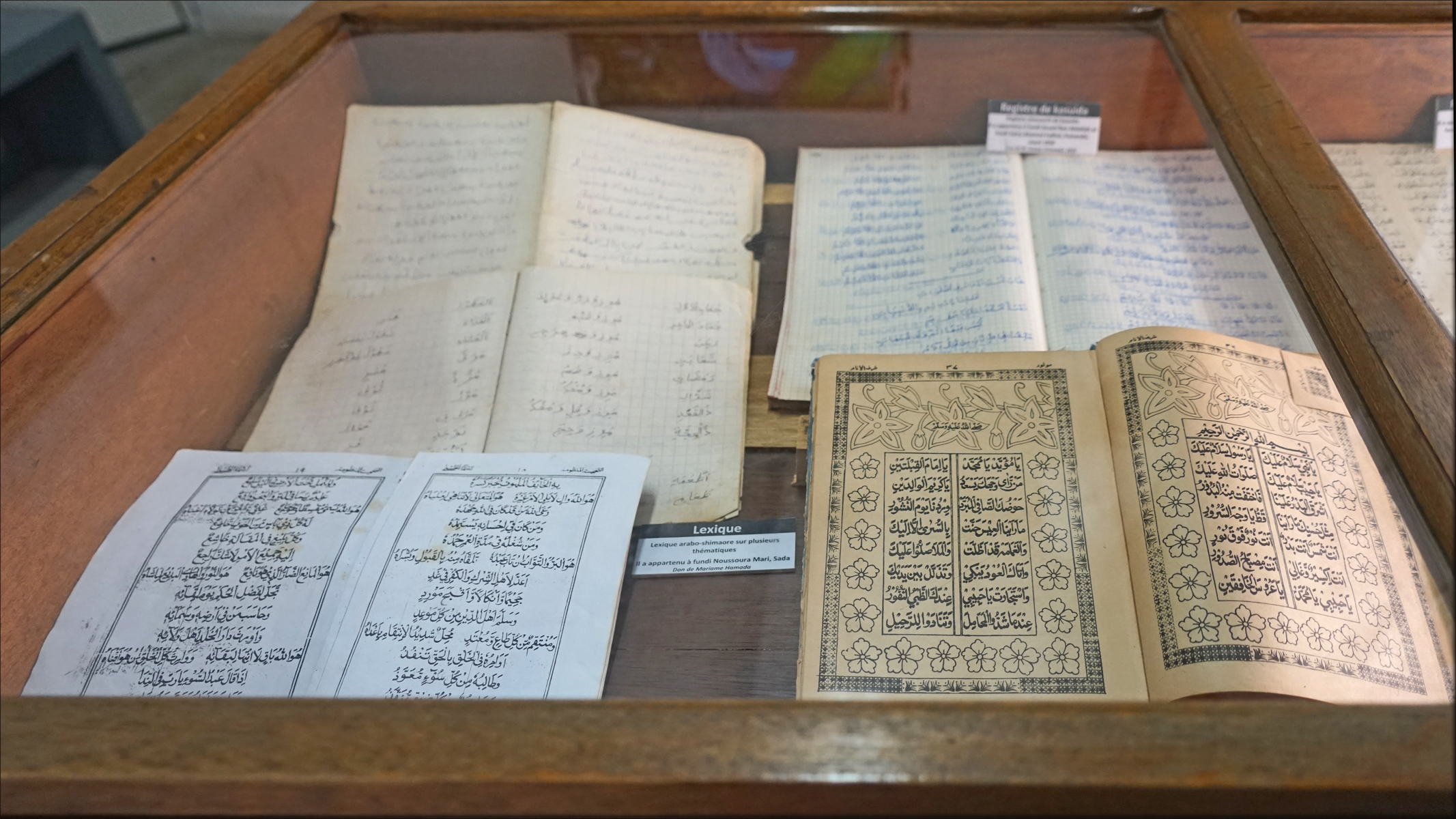 Documents en arabe et en shimaore ayant appartenu à fundi Noussoura Mari, de Sada, Mayotte La salle n°2 du musée de Mayotte est consacrée à l'école coranique, comme école de vie.